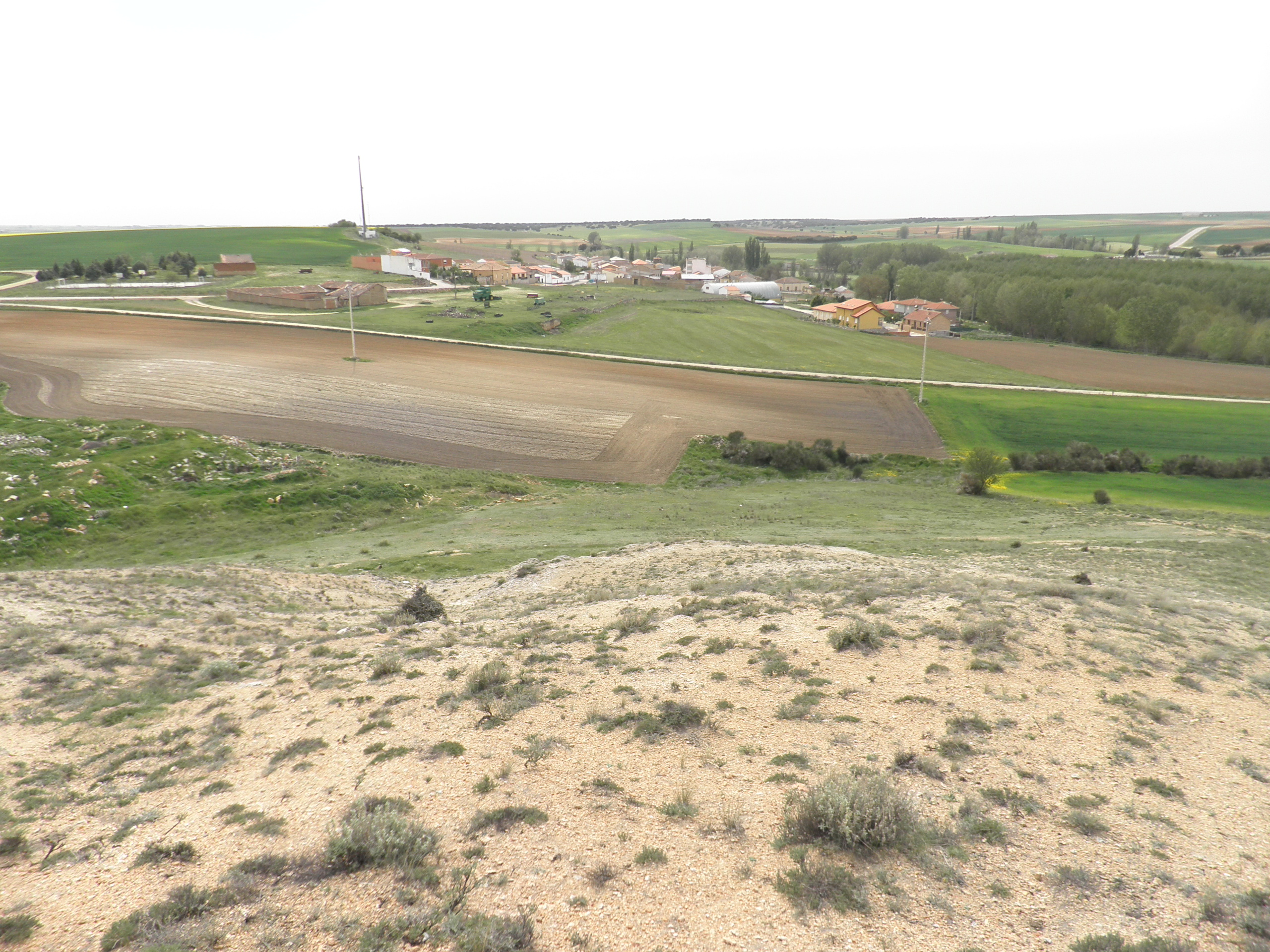 Vista de Vallesa de La Guareña desde cerro La Gavia